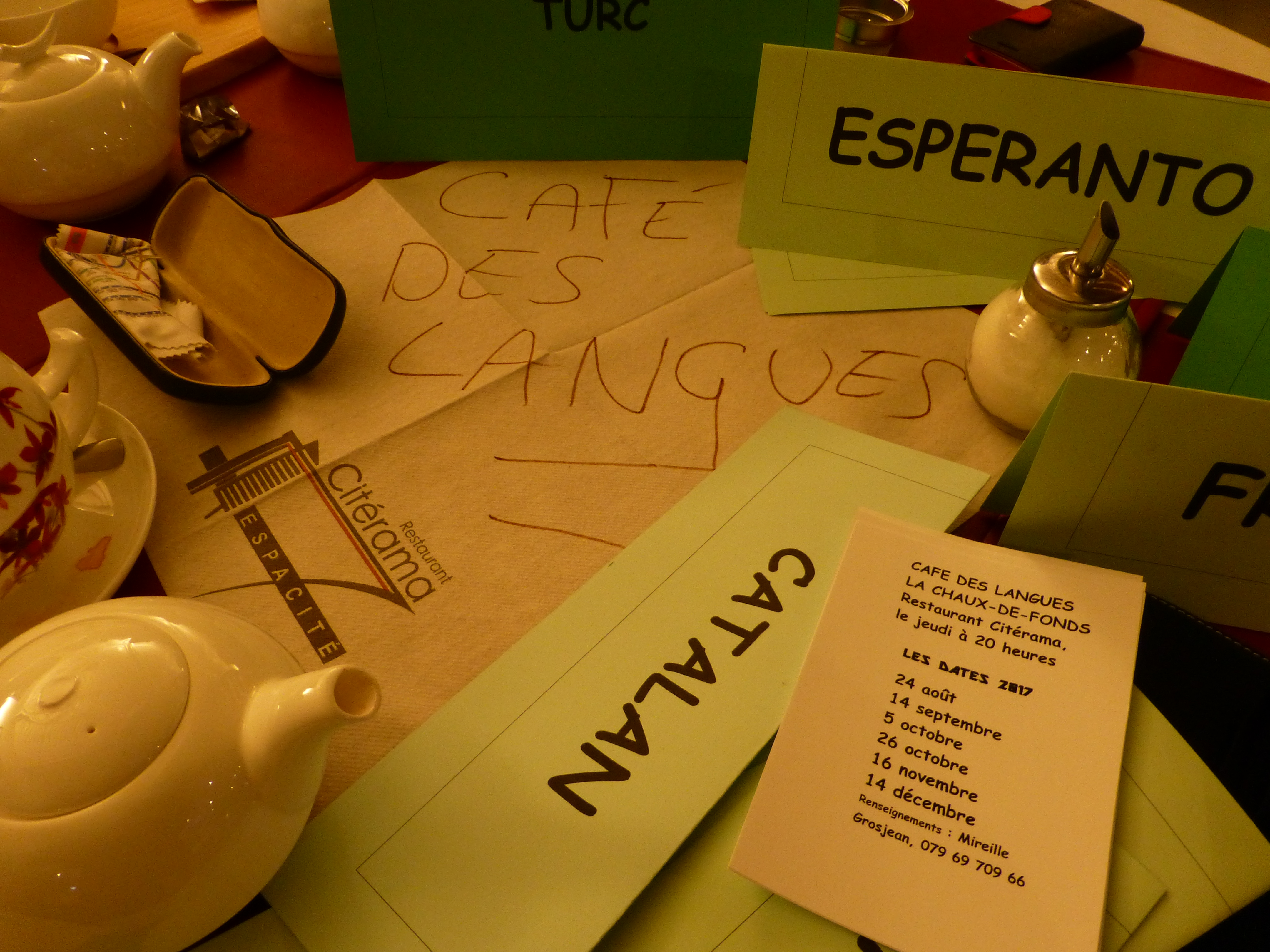 Lingva kafejo en La Chaux-de-Fonds, Svislando